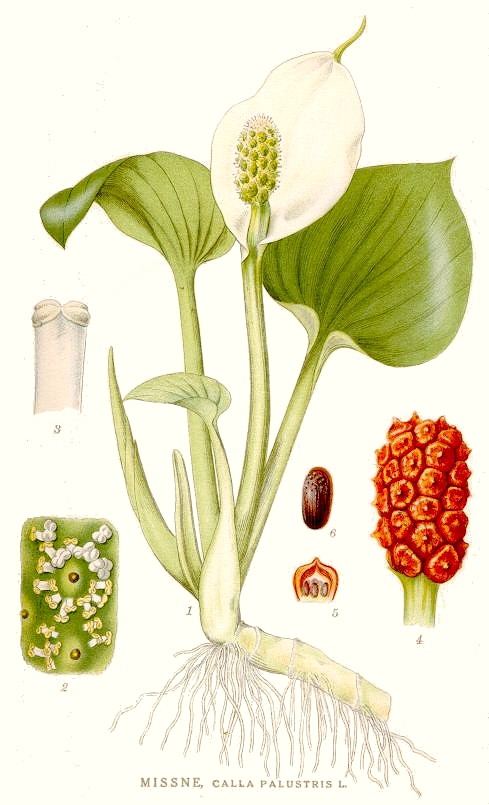 Calla palustris L. Original Description Missne, Calla palustris L.